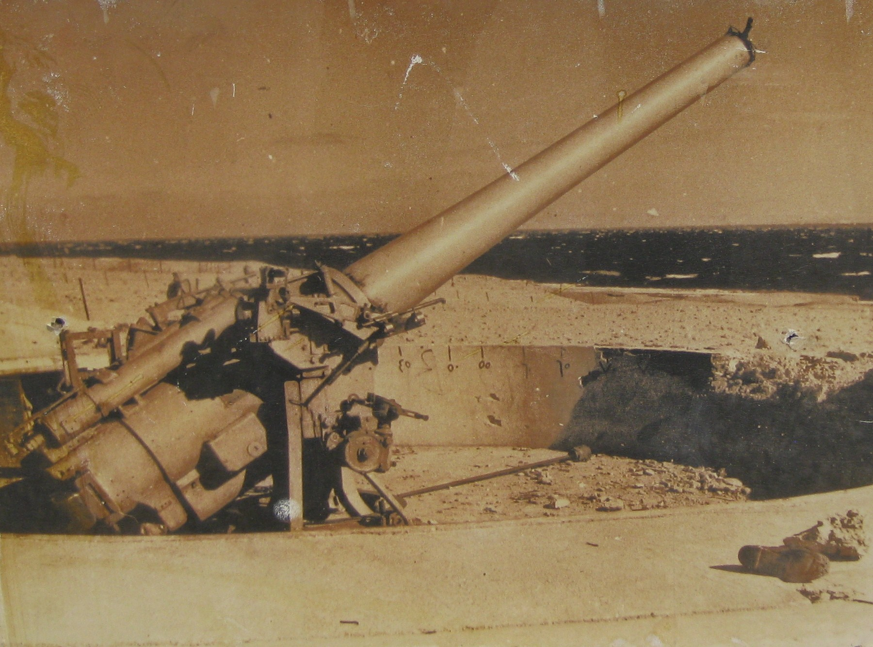 Tiran Guns מוזיאון בתי האוסף - תותחי טירן